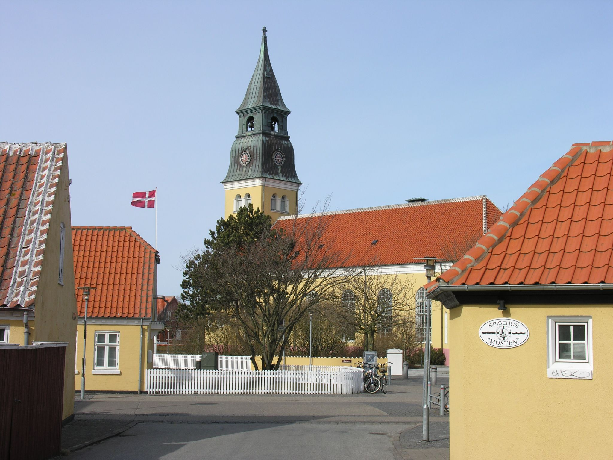 Skagen church in Skagen, Denmark